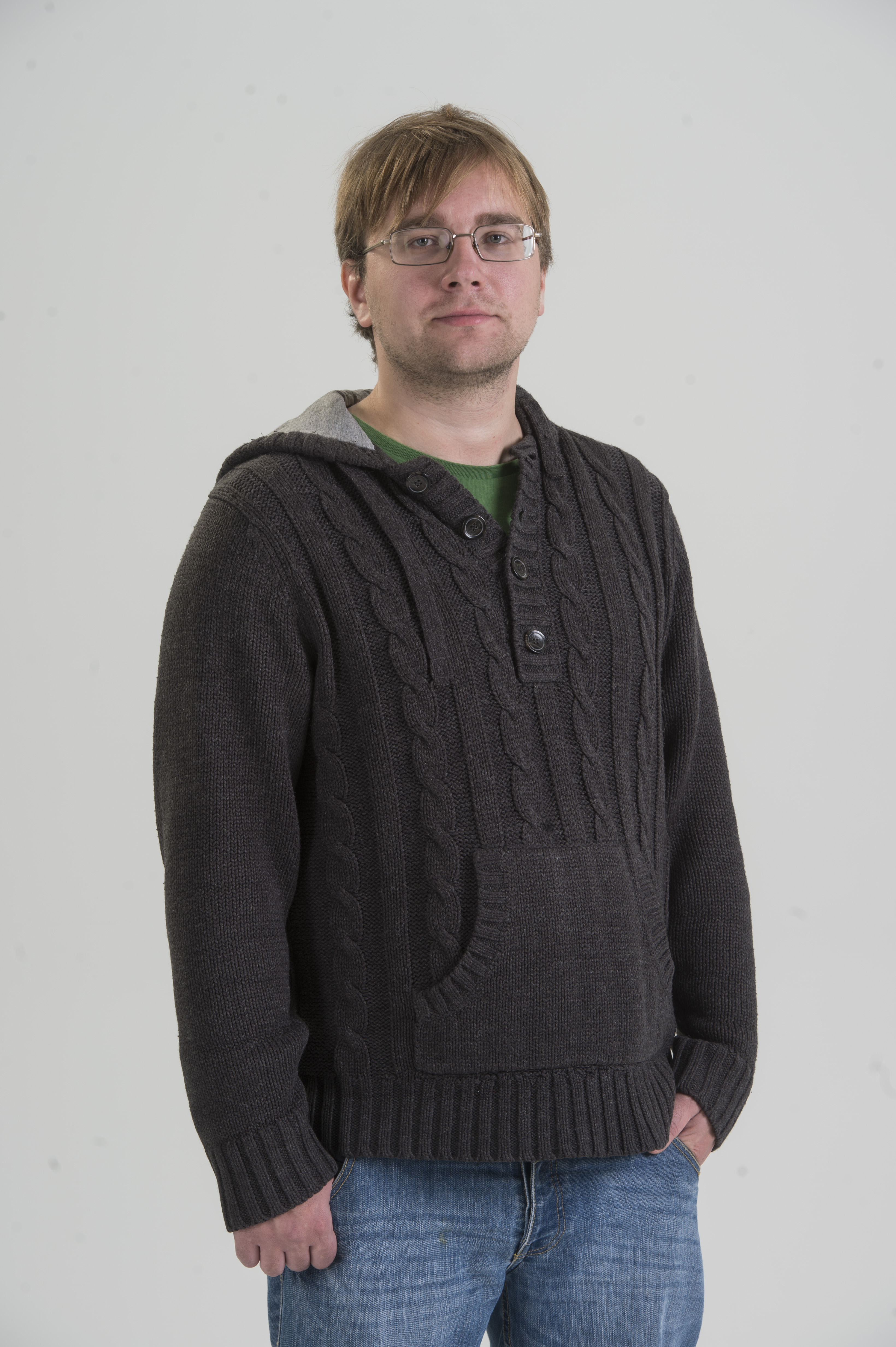 Dannar Leitmaa